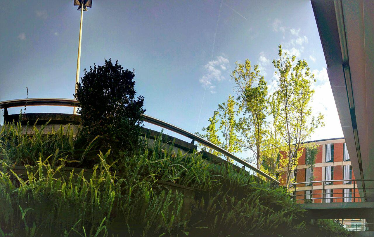 محوطه کمپ شمالی دانشگاه UPC